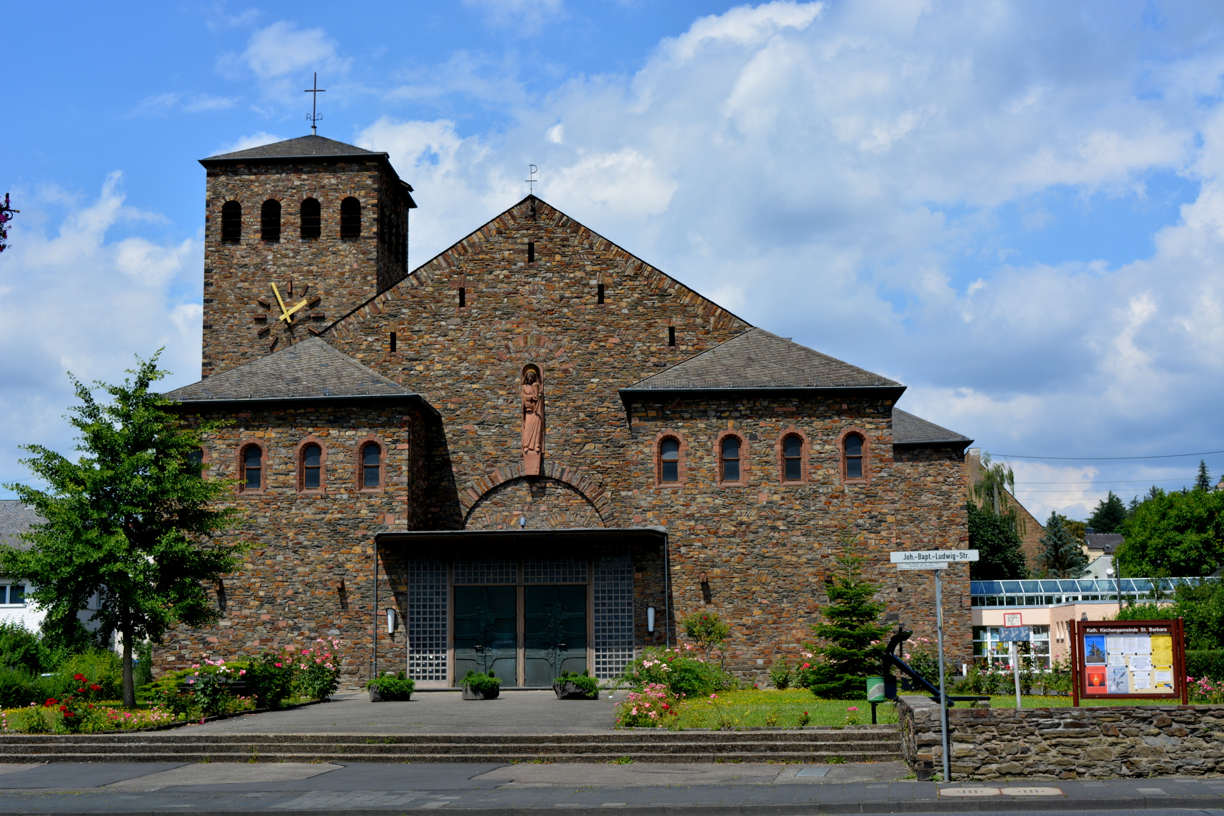 Lahnstein, Barbarakerk